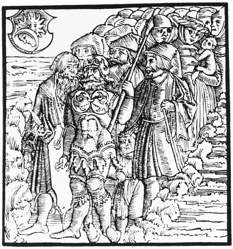 "Пераход цераз Іардан". Кніга Ісуса Навіна. Прага. 1517. Тытульны акуш. 105Х104 мм